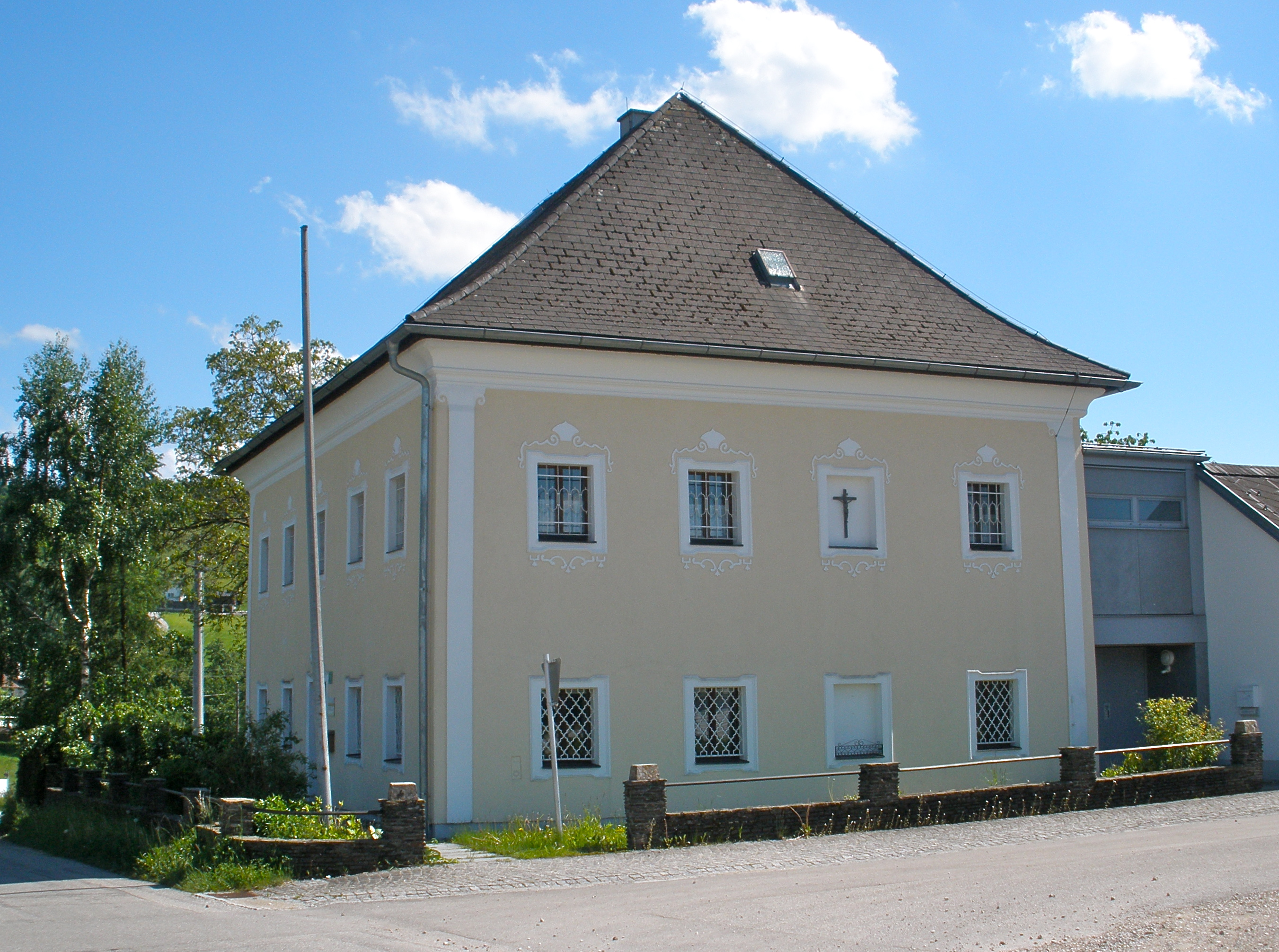 Römisch-katholisches Pfarramt in Gschwandt bei Gmunden